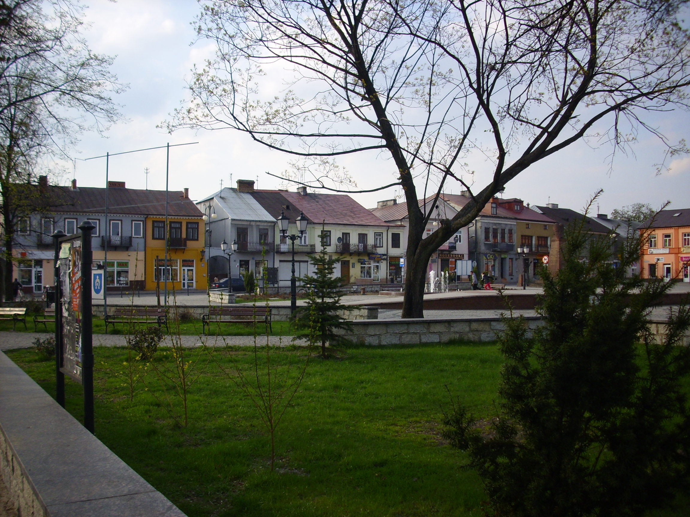 Rynek w Międzyrzecu Podlaskim – wiosna 2010